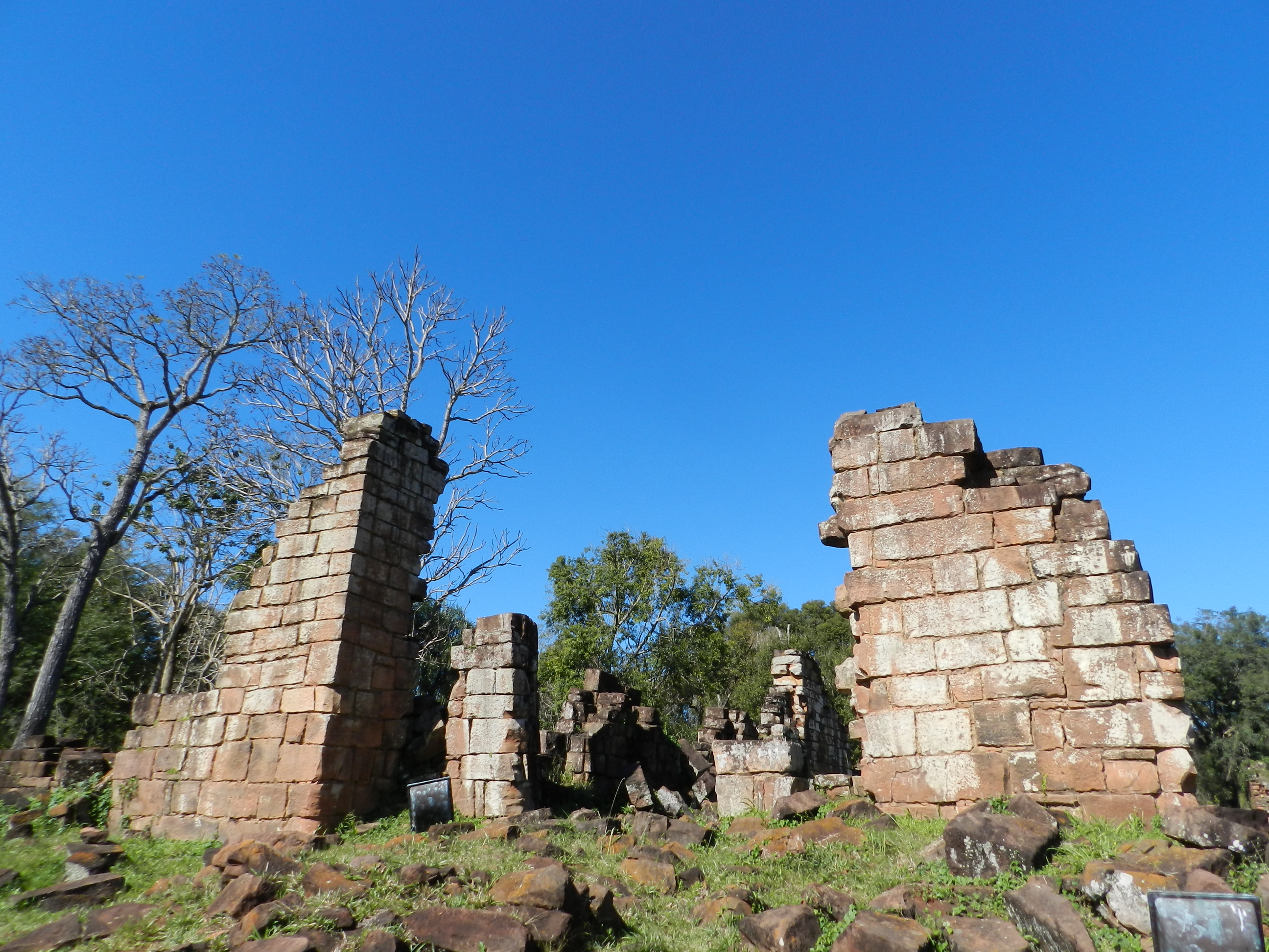 Conjunto Jesuítico de Santa Ana